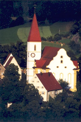 Copyright durch Herrn Stefan Rieger, Internetbeauftragter der Stadt Aalen, freigegeben.